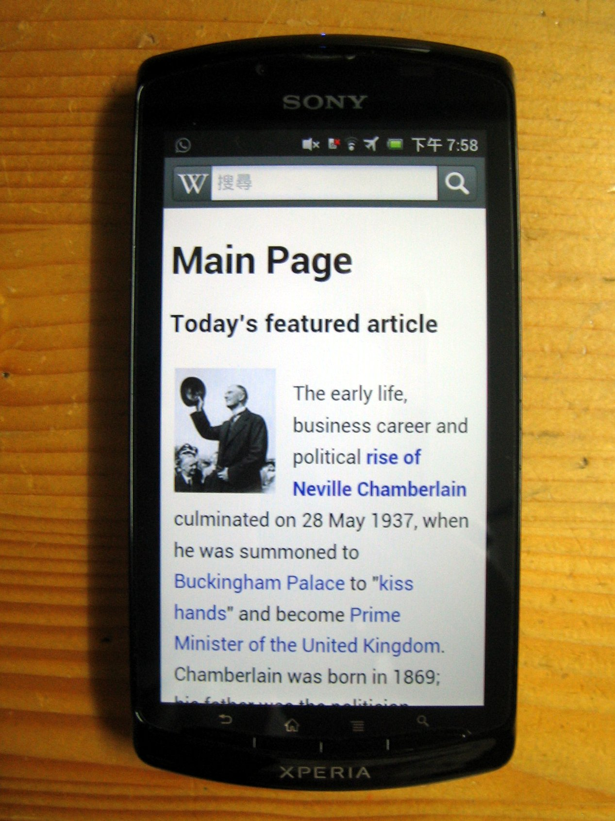 中文（香港）: Sony Xperia neo L 的外型